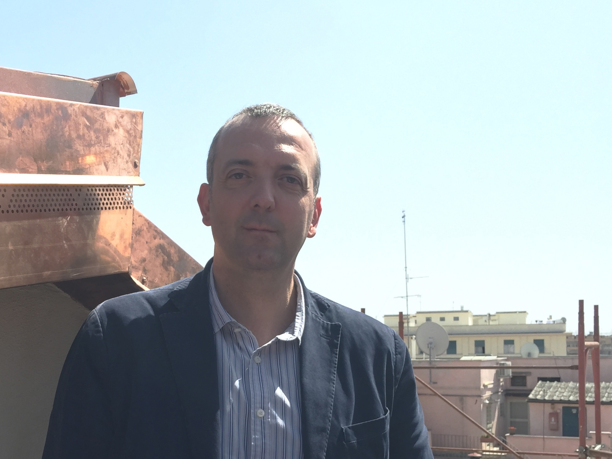 Francesco Ragno Architetto